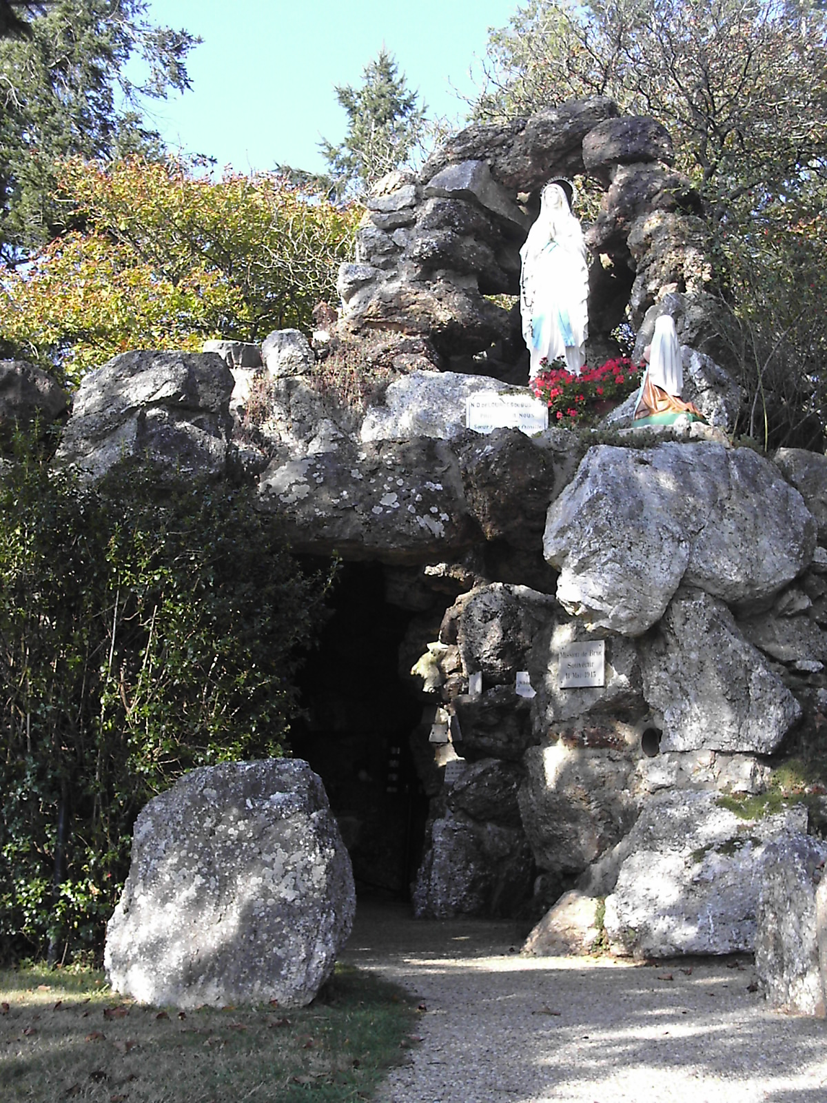 Grotte de Fréval à Bruc sur Aff (35)